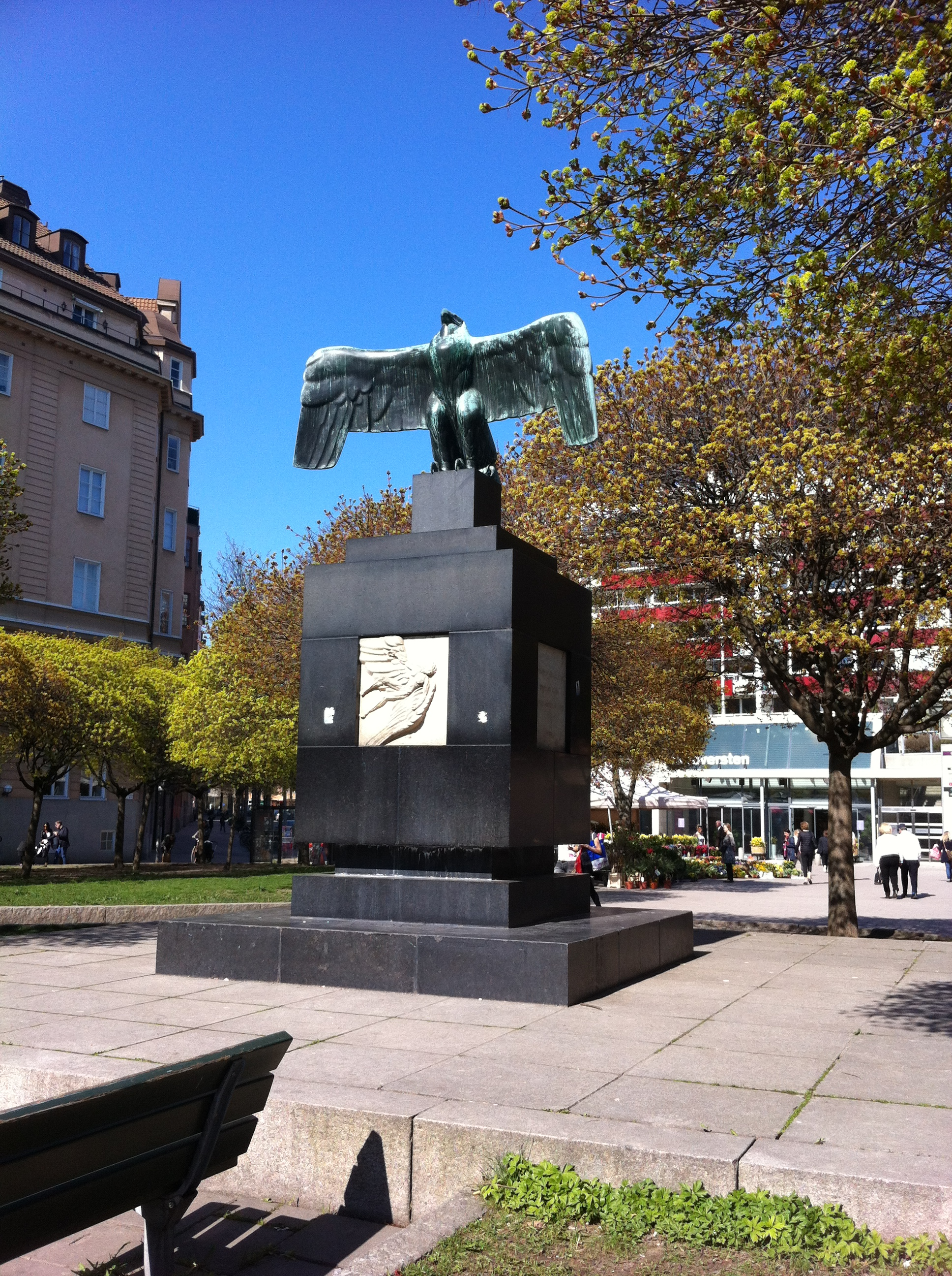 Östermalm, Stockholm, Sweden